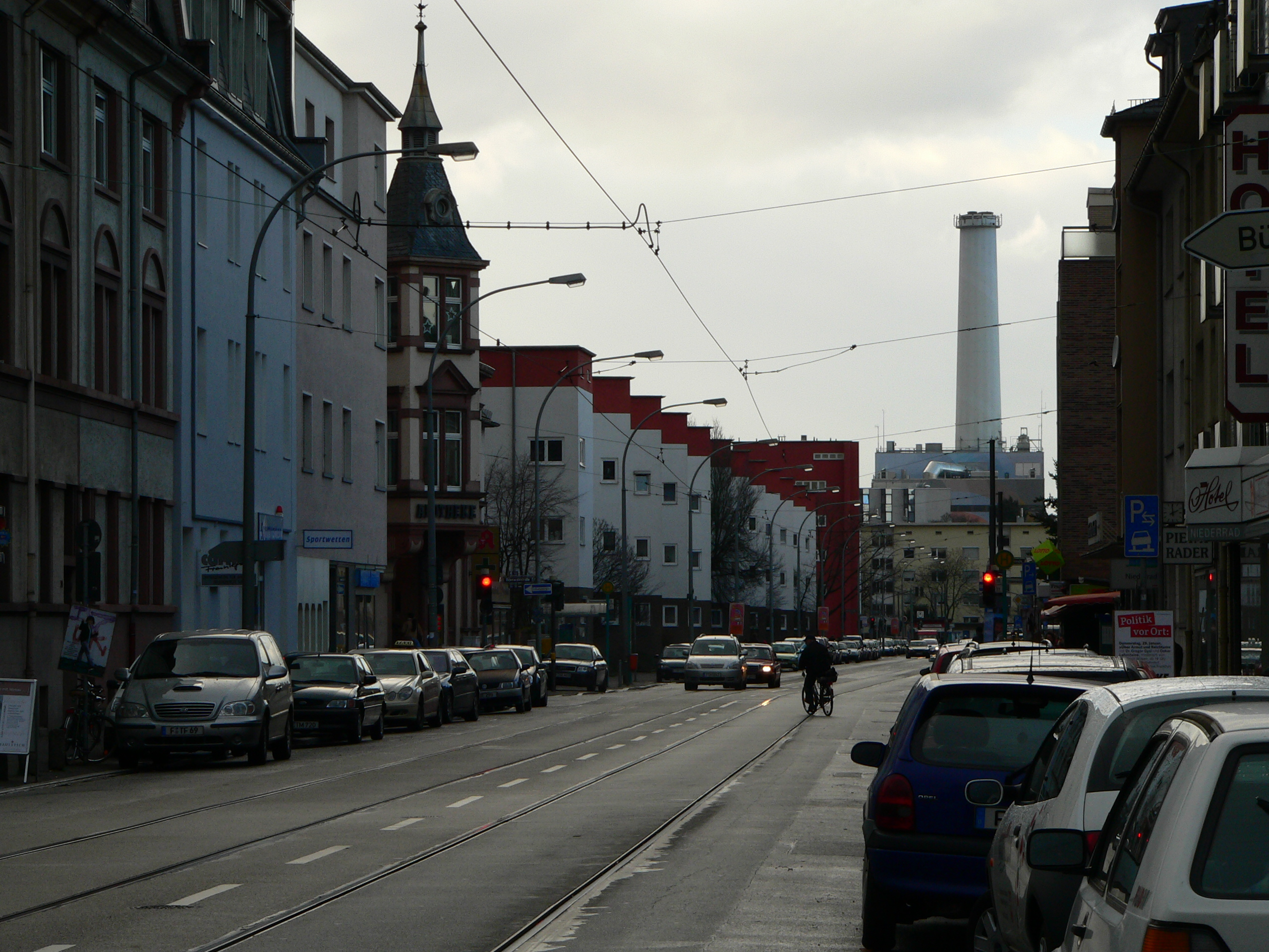 Frankfurt-Niederrad, katholische Kirche